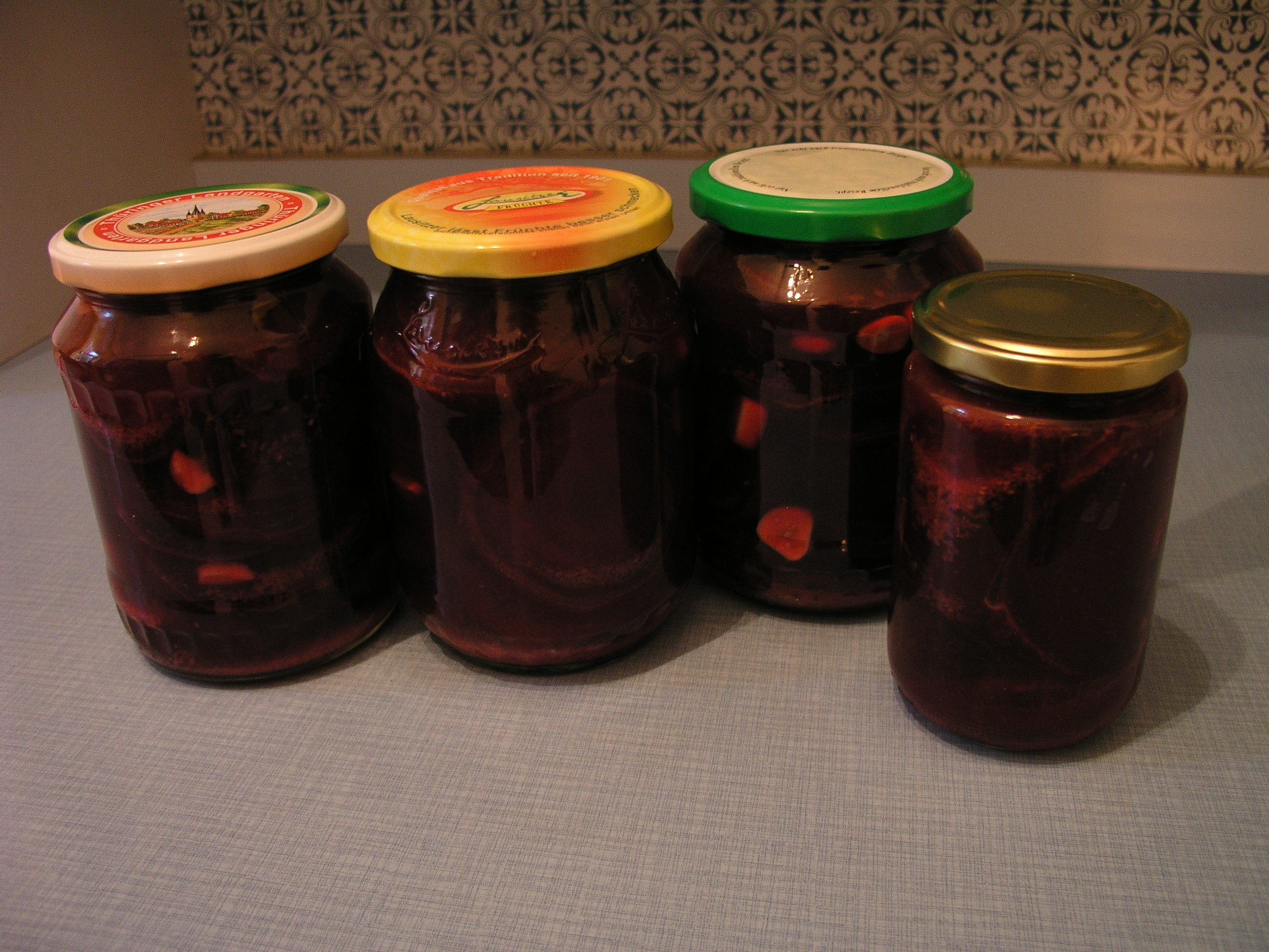 Pickled beetroot (danish: syltede rødbeder)